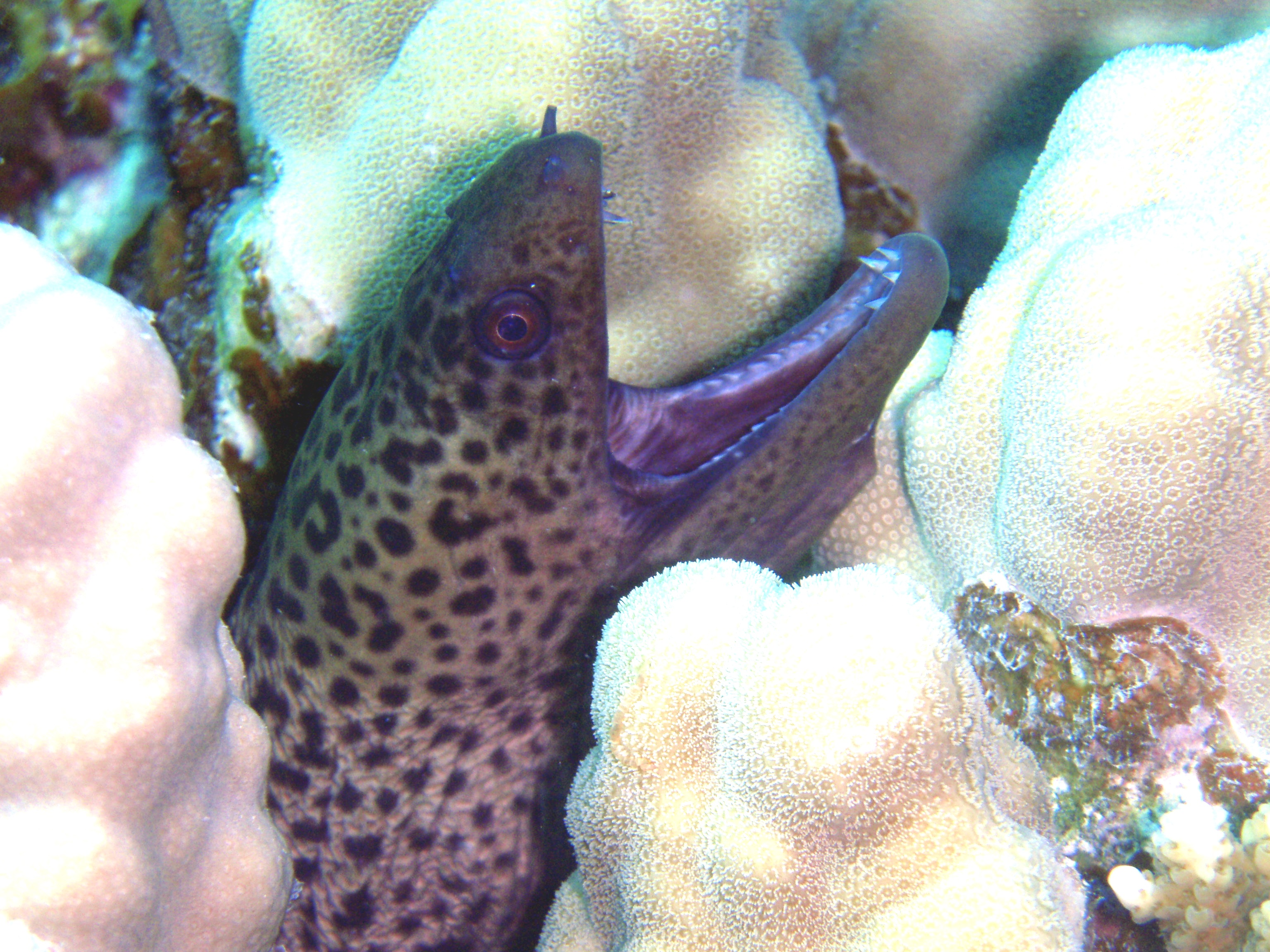 juvenile Riesenmuräne mit geöffnetem Maul